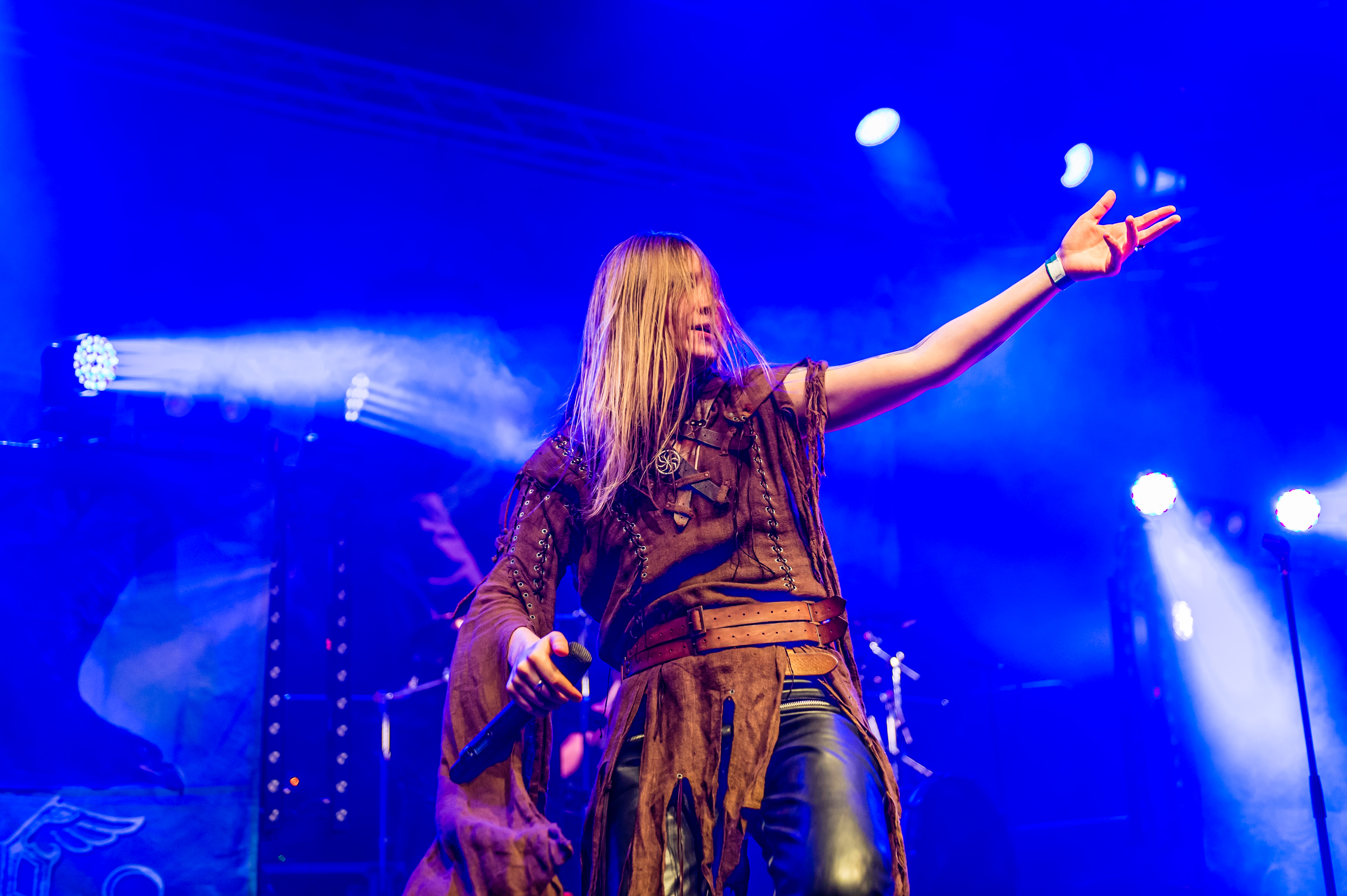 'Arkona - Ruhrpott Metal Meeting 2015 - Oberhausen'